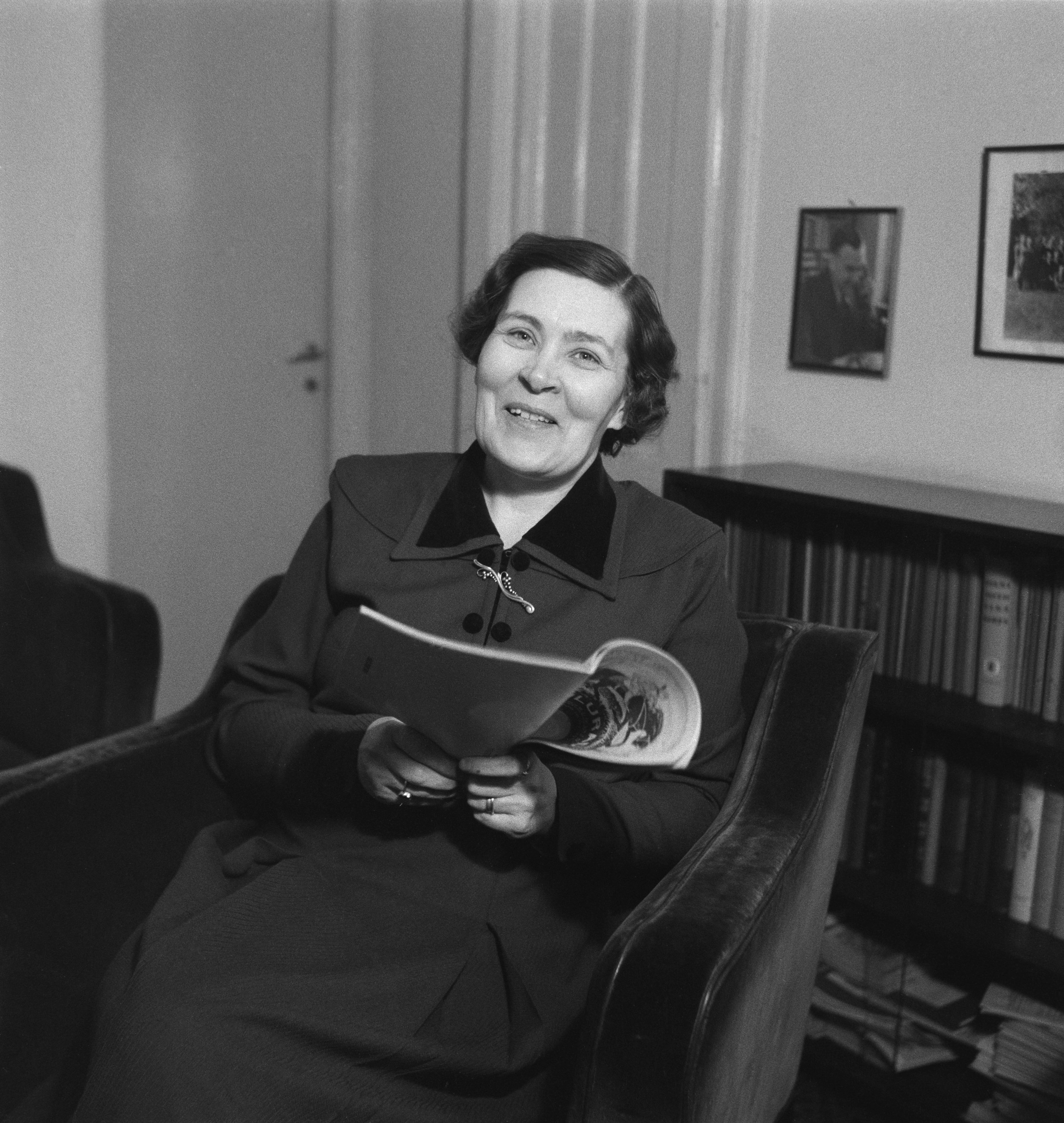 Yleisradion kouluradion päällikkö Helmi Palmén 31.1.1951. Photo: Ruth Träskman/Yle. Tiedätkö jotain tästä kuvasta? Jätä kommentti tai ota yhteyttä sähköpostitse: Tutustu Ylen arkistosisältöihin: Fler skatter från Yles arkiv: More about Yle, the Finnish Broadcasting Company